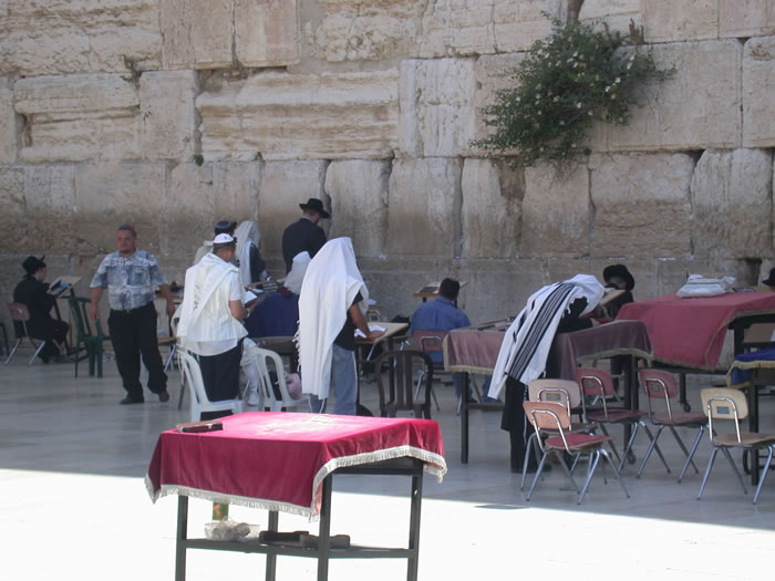 Klaagmuur in Jeruzalem Israel 2005.